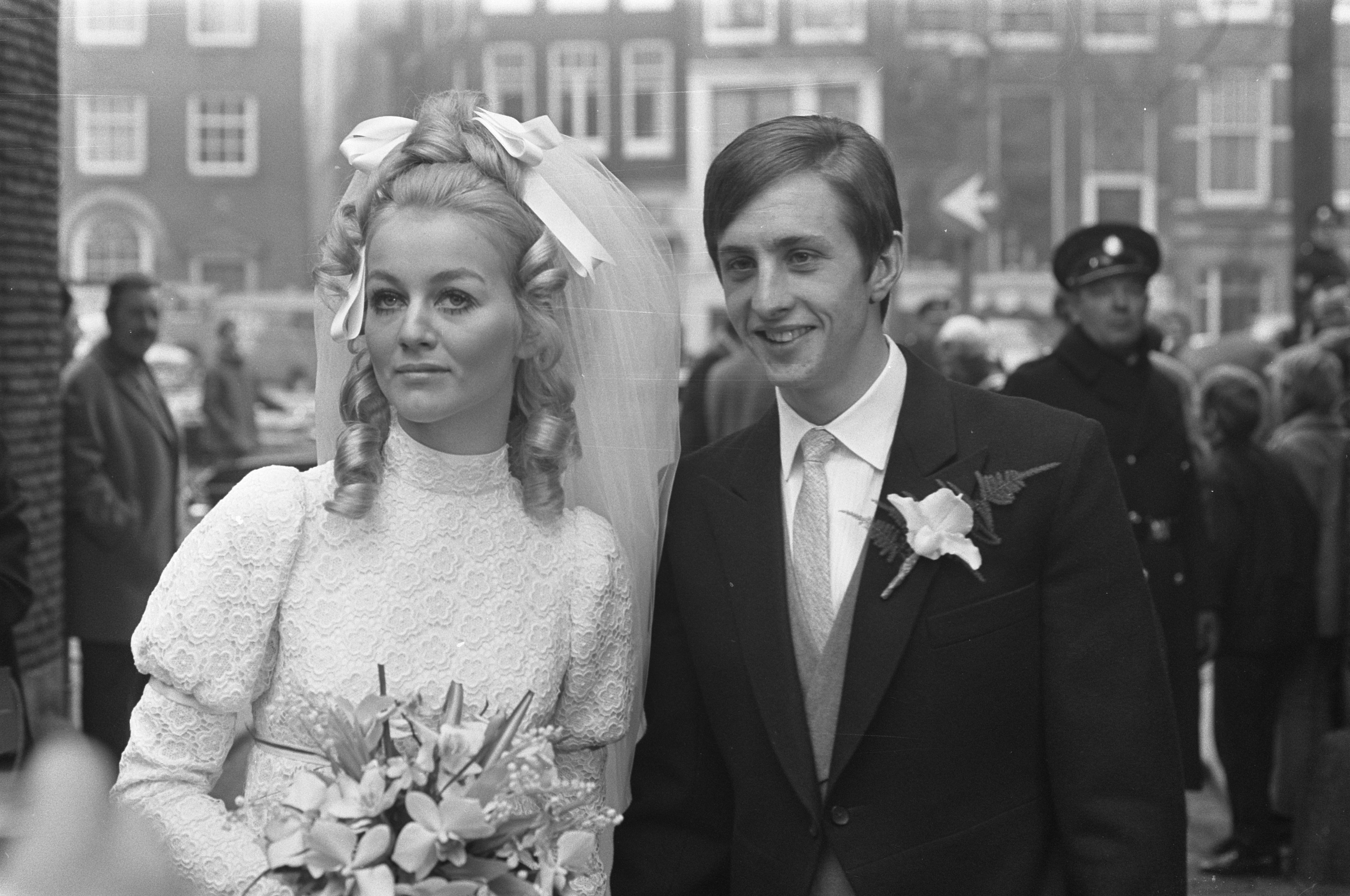 Collectie / Archief : Fotocollectie Anefo Reportage / Serie : [ onbekend ] Beschrijving : Johan Cruijff getrouwd met Danny Coster het bruidspaar bij het stadhuis Datum : 2 december 1968 Trefwoorden : bruidsparen, stadhuizen Persoonsnaam : Cruijff, Johan, Danny Coster Fotograaf : Kroon, Ron / Anefo Auteursrechthebbende : Nationaal Archief Materiaalsoort : Negatief (zwart/wit) Nummer archiefinventaris : bekijk toegang 2.24.01.05 Bestanddeelnummer : 921-9071 Reacties Geplaatst door Maaike op 09 september 2012 - 21:12. Stadhuis te Amsterdam